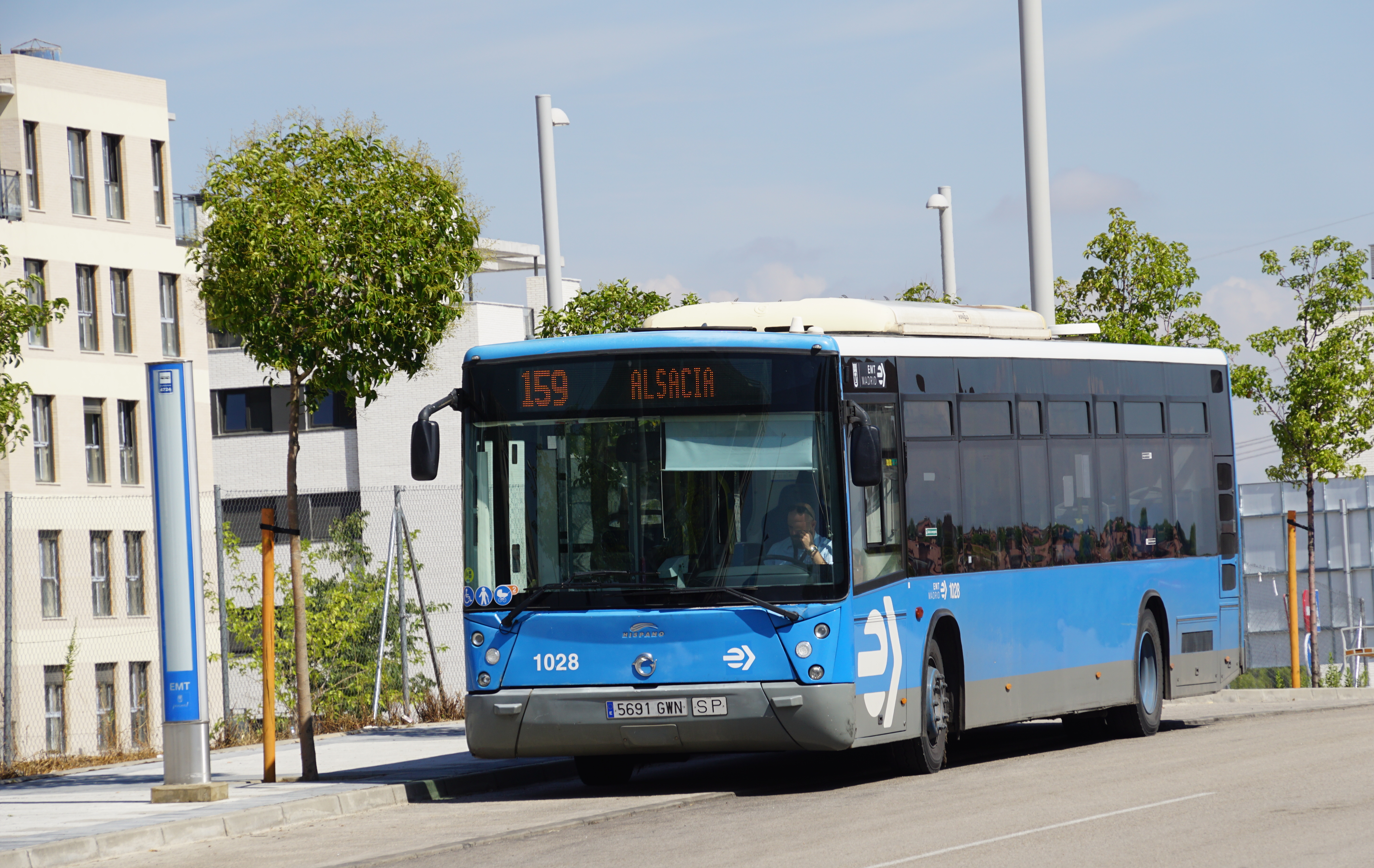 Final de la línea 159 de EMT Madrid en El Cañaveral